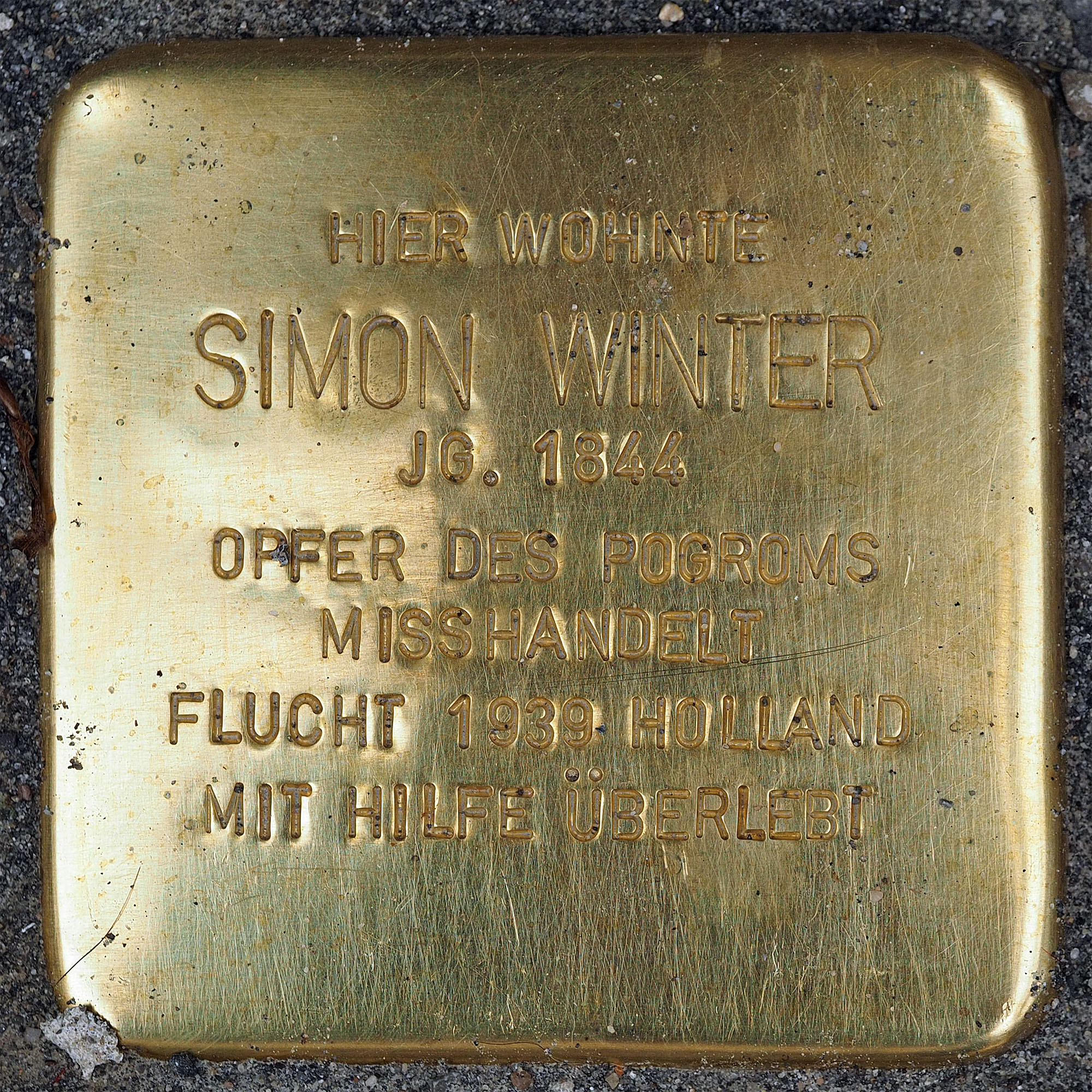 Stolpersteine Kempen: Winter, Simon